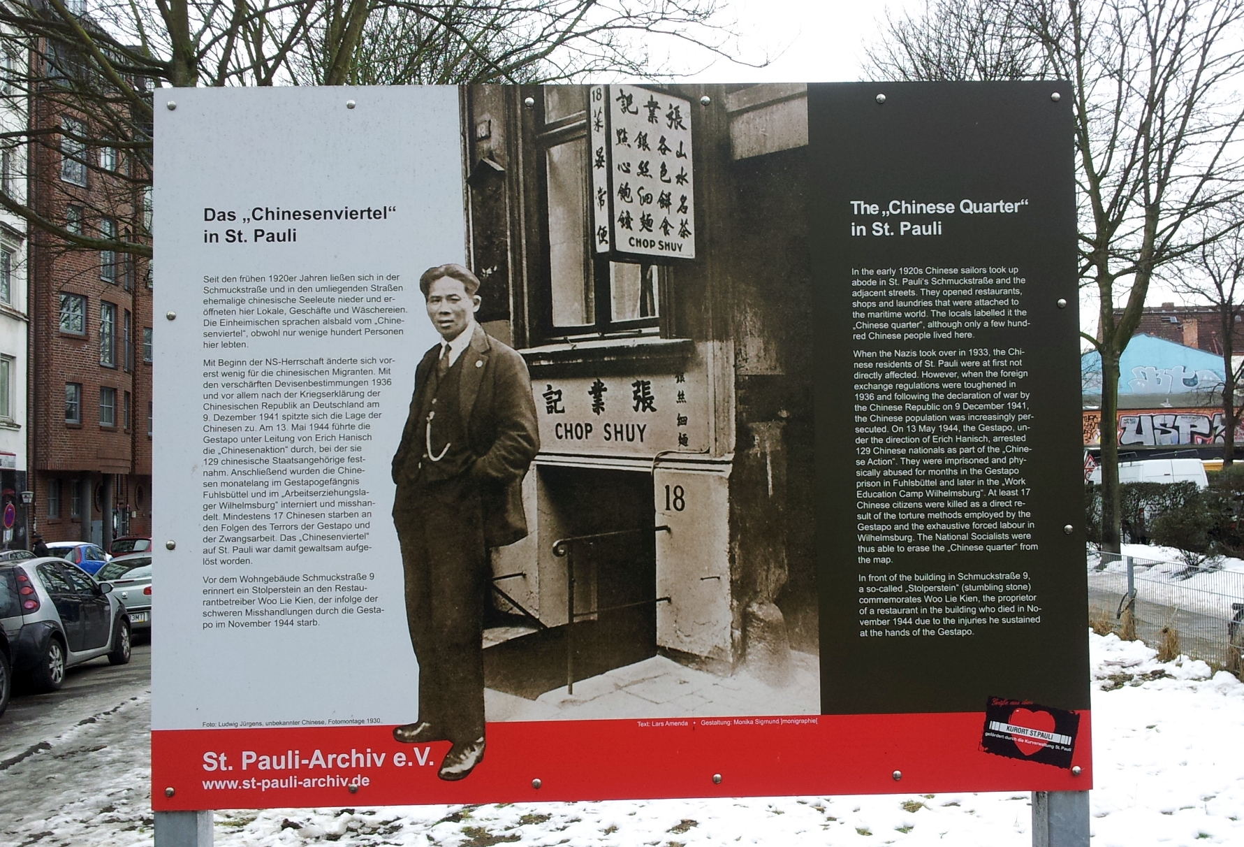 gedenktafel in der schmuckstraße hamburg st. pauli